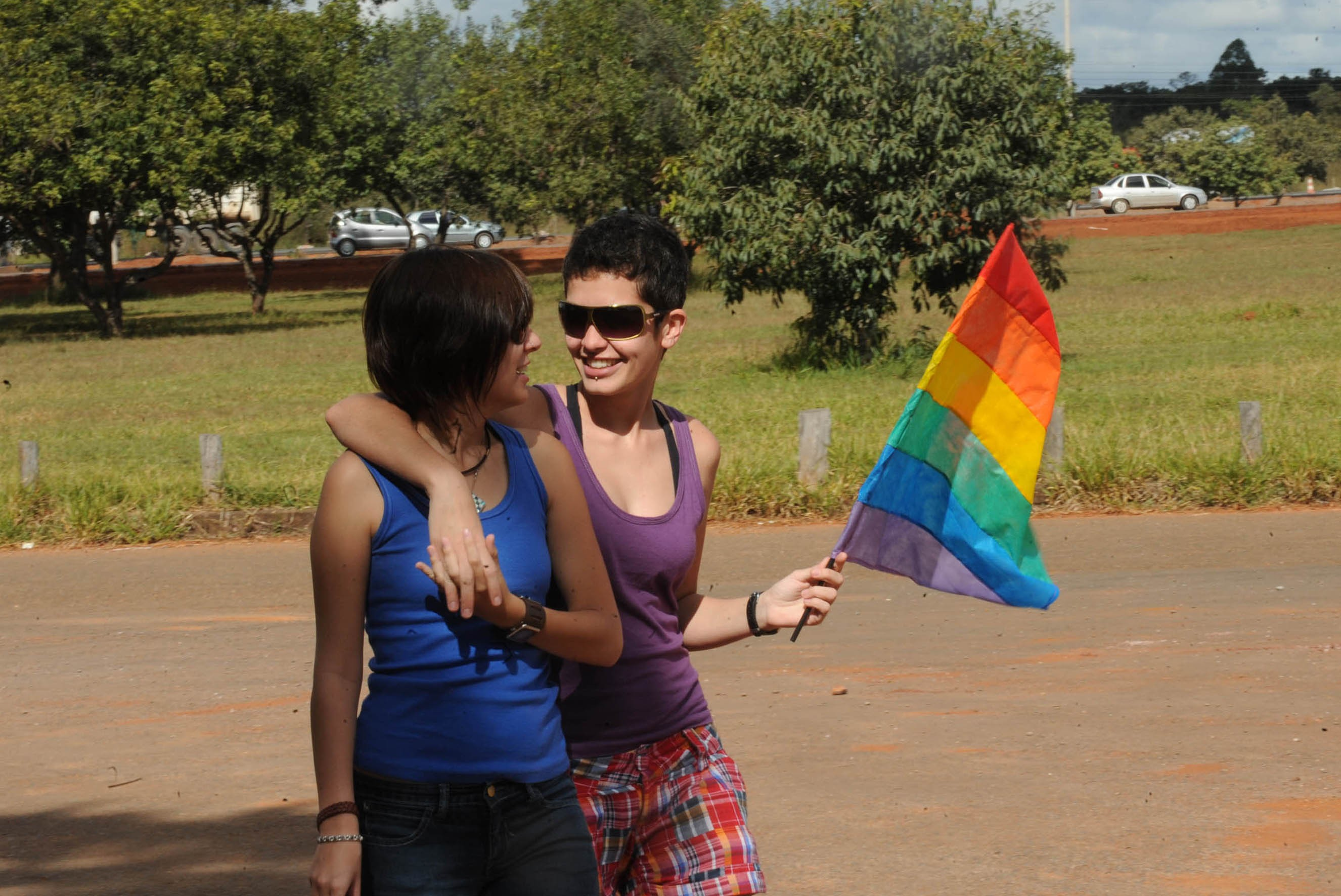 Lésbicas no Parque da Cidade-Brasília-DF